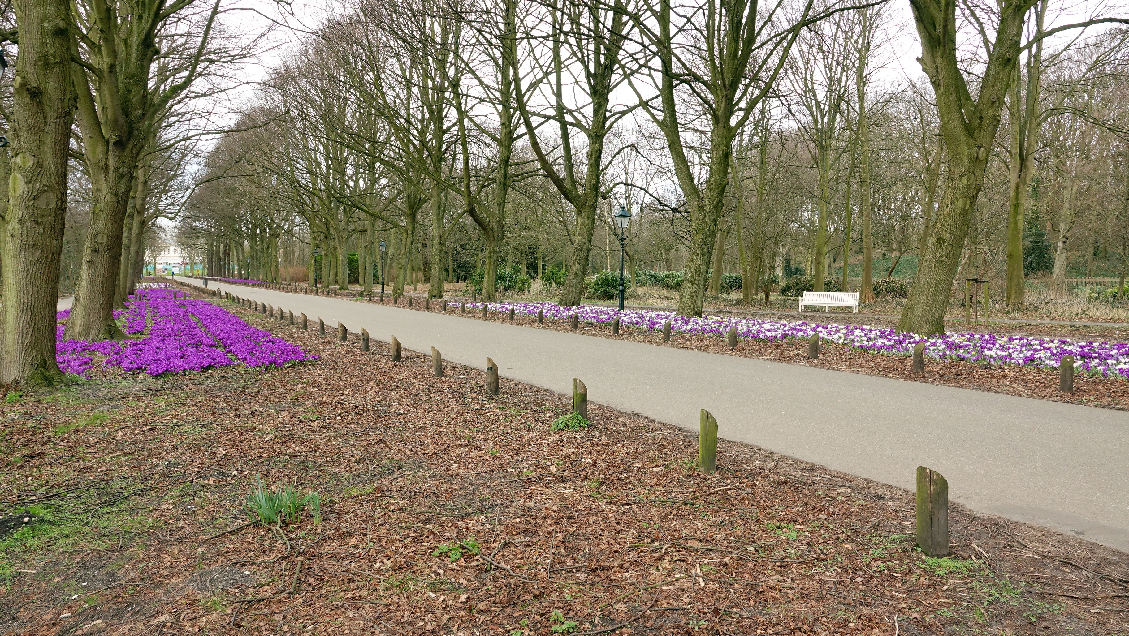 10-3-2017 . Landgoed Ockenburgh ligt tussen Kijkduin en Loosduinen.